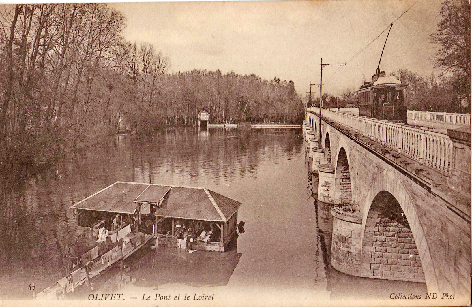 Carte postale ancienne éditée par ND n°17 : OLIVET - Le pont de pierre. En contrebas, un lavoir. Côté amont.